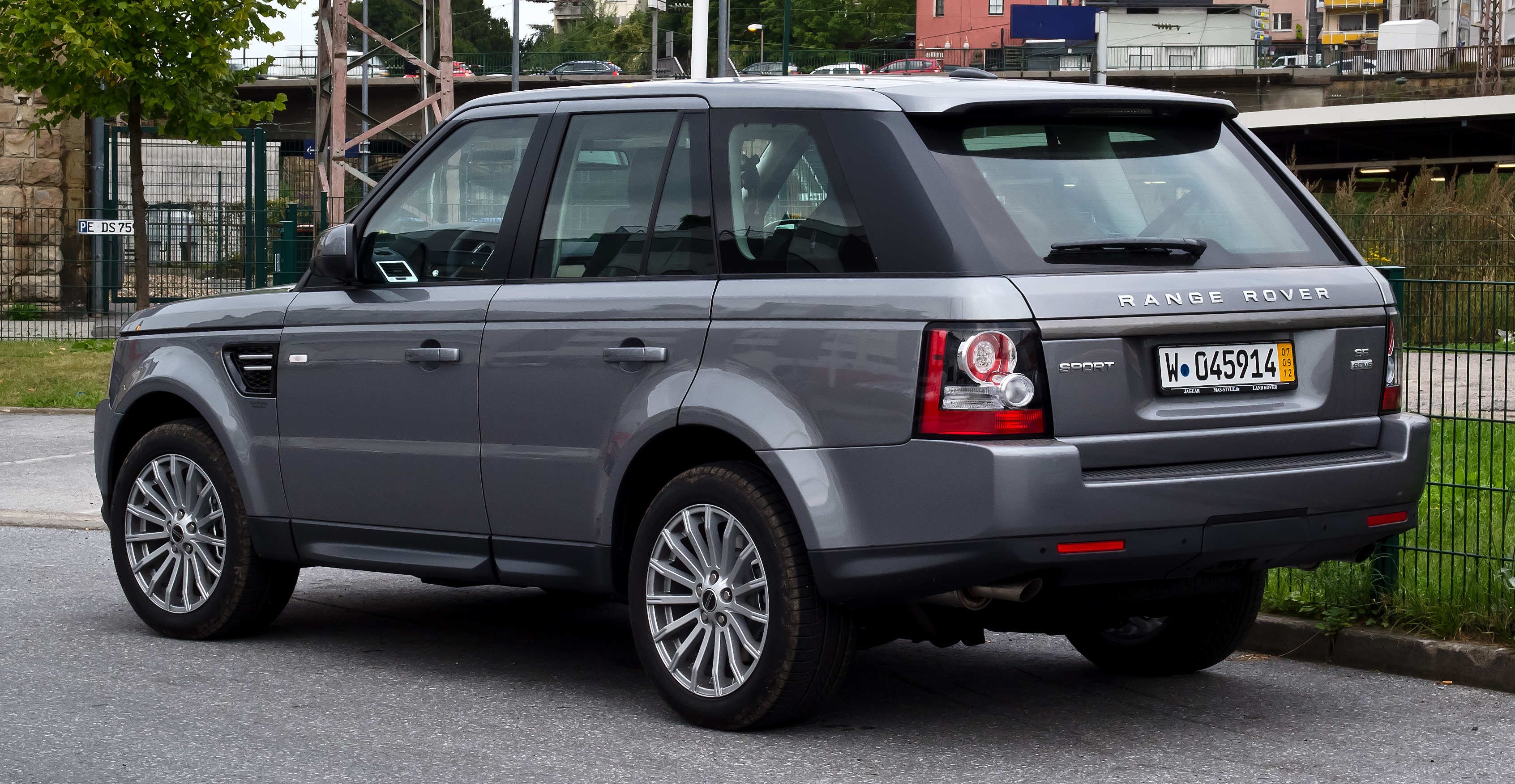 Range Rover Sport SDV6 SE (Facelift)